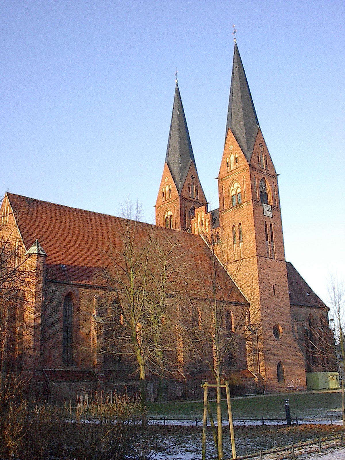 Klosterkirche Sankt Trinitatis Neuruppin